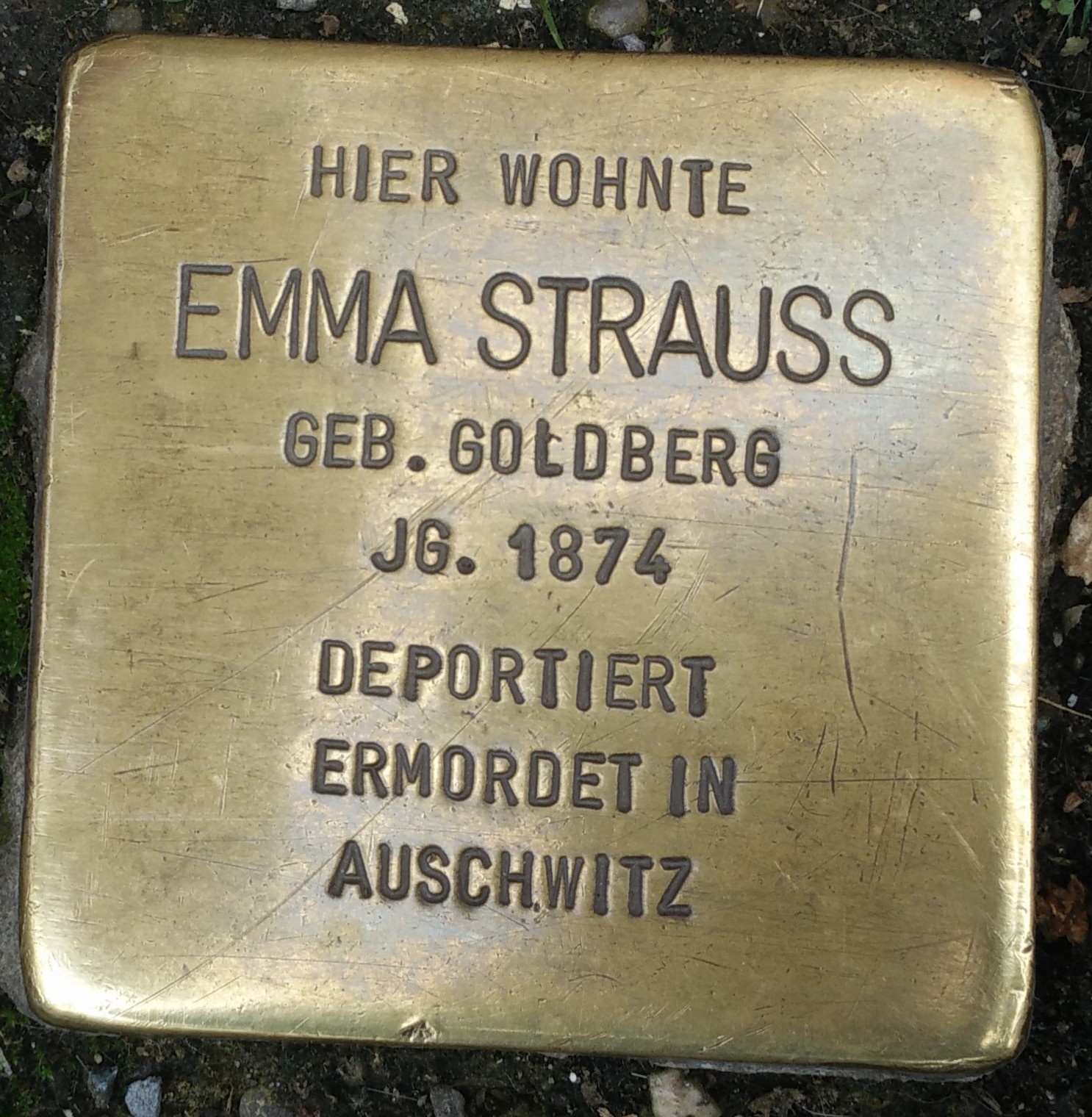 Bad Vilbel, Stolperstein Emma Strauss